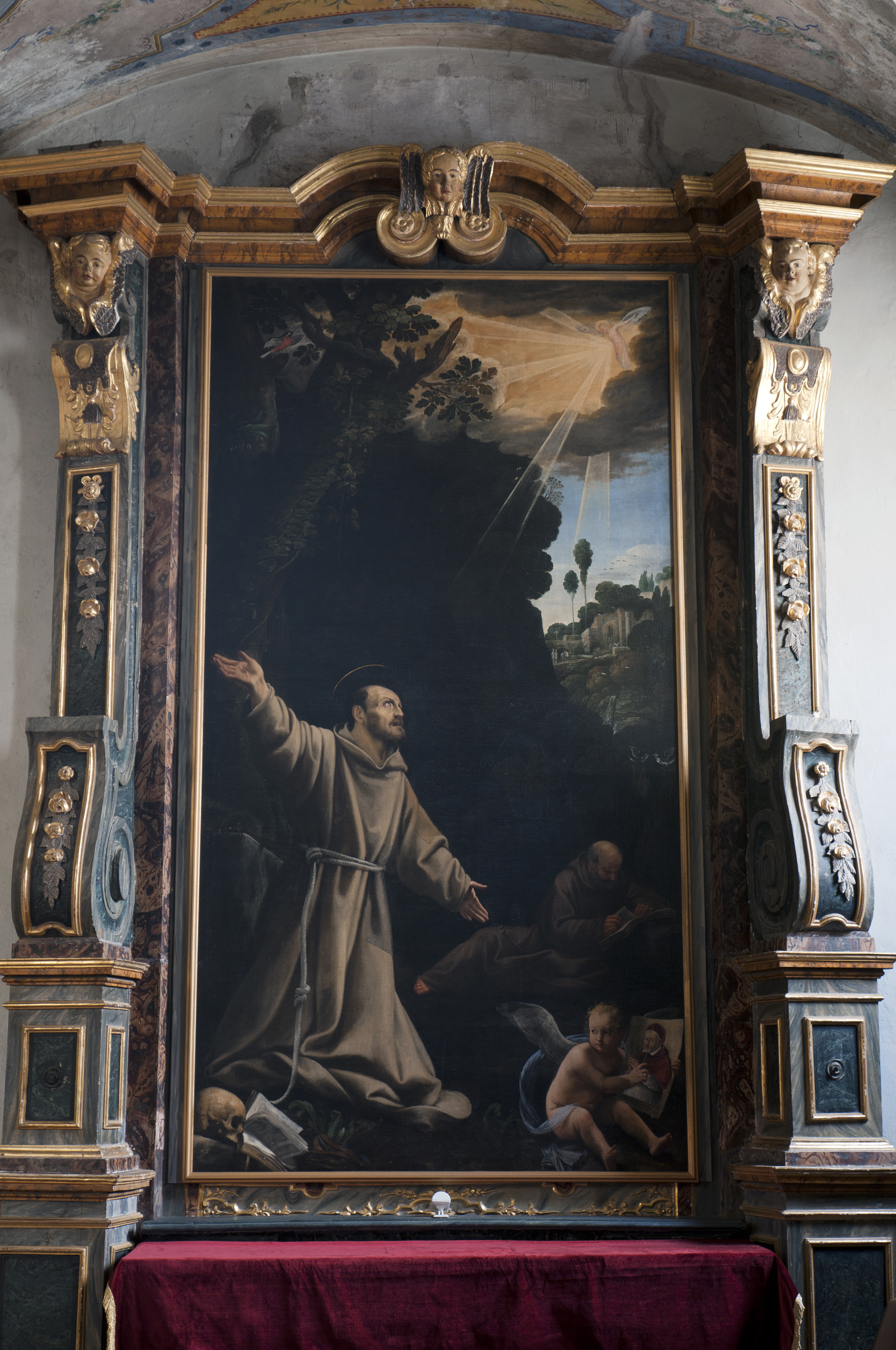 Pala da altare "San francesco riceve le Stimmate" - C. Saraceni - Lanzo Torinese (TO) - ITALIA